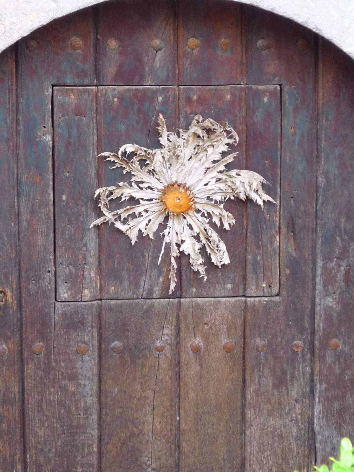 Eguzki-lorea sobre una puerta en Izarra (Urkabustaiz, Álava)